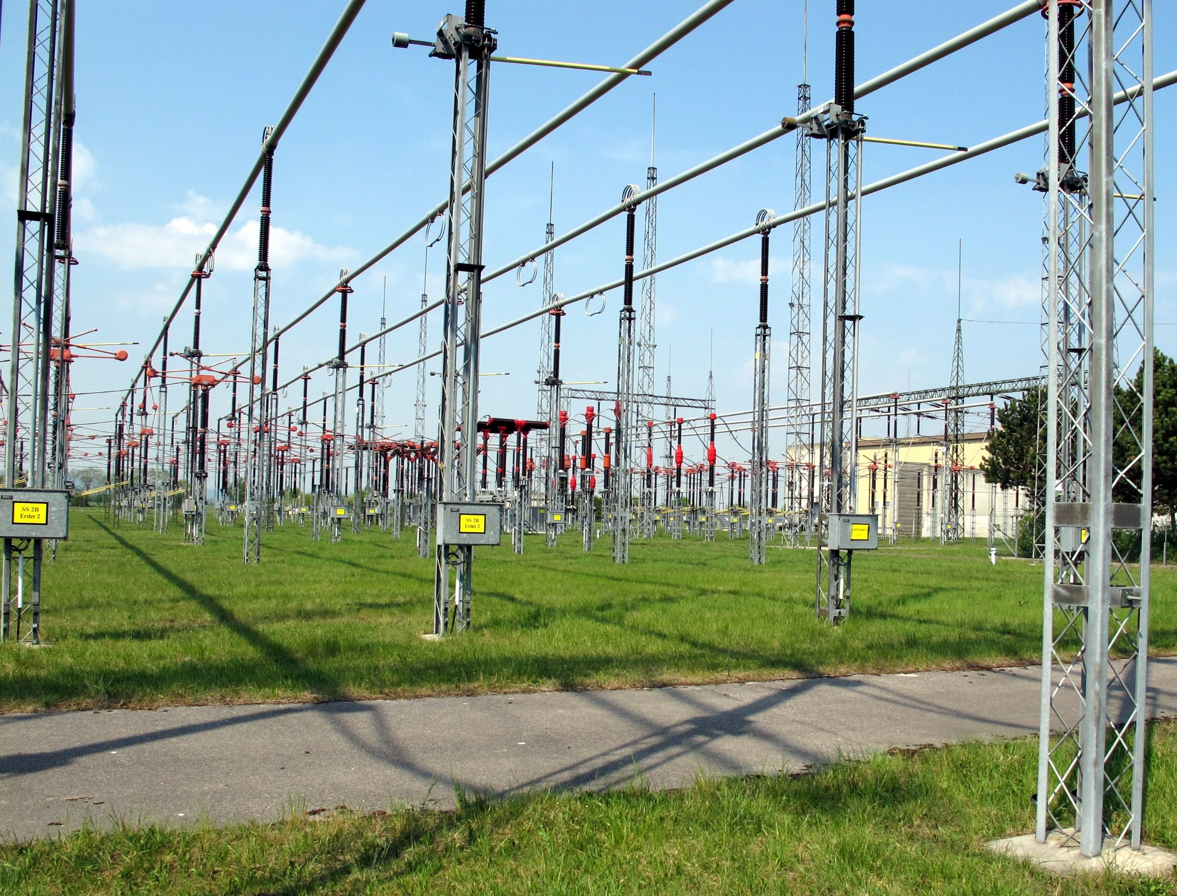 Umspannwerk Dürnrohr; Westliches 380-kV-Freiluftschaltfeld. Rechts im Hintergrund die Konverterhalle der ehemaligen GKK Dürnrohr und Abgang der 380-kV-Leitungen nach Slavětice (Tschechien)